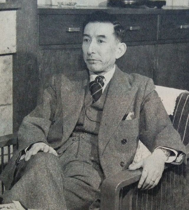 三島通陽